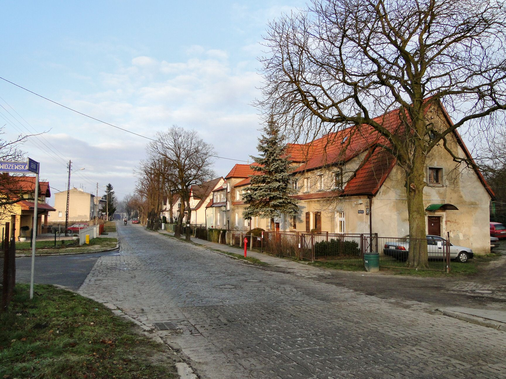 Szczecin Żydowce ul. Mechaniczna